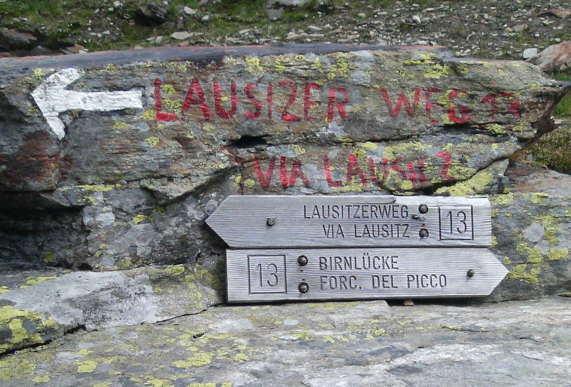 Wegausschilderung unweit der Birnlückenhütte